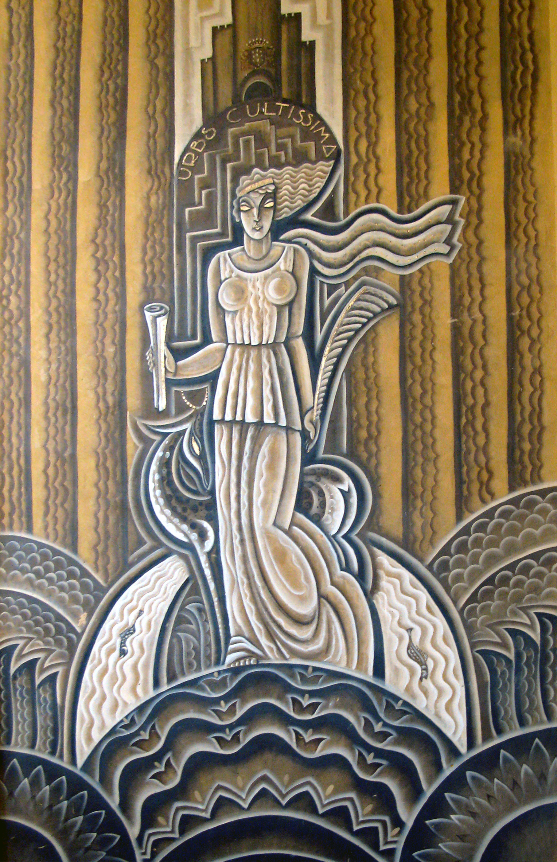 Montdidier (Somme, France) - Peinture murale dans l'Hôtel-de-ville. Cette oeuvre de style "Art déco" (visible dans l'escalier menant au premier étage, sur le palier) est de Maurice Pico. Cette vue n'est pas rigoureusement fidèle, puisque prise de côté, elle a subi un léger "taillage" et un traitement numérique visant à réduire partiellement la perspective et les inclinaisons.